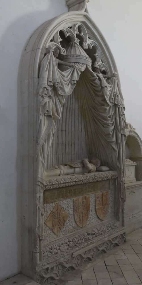 Diogo Pires-o-Velho, Túmulo de Fernão Teles de Meneses, 1480, Igreja do Mosteiro de S. Marcos (Universidade de Coimbra)